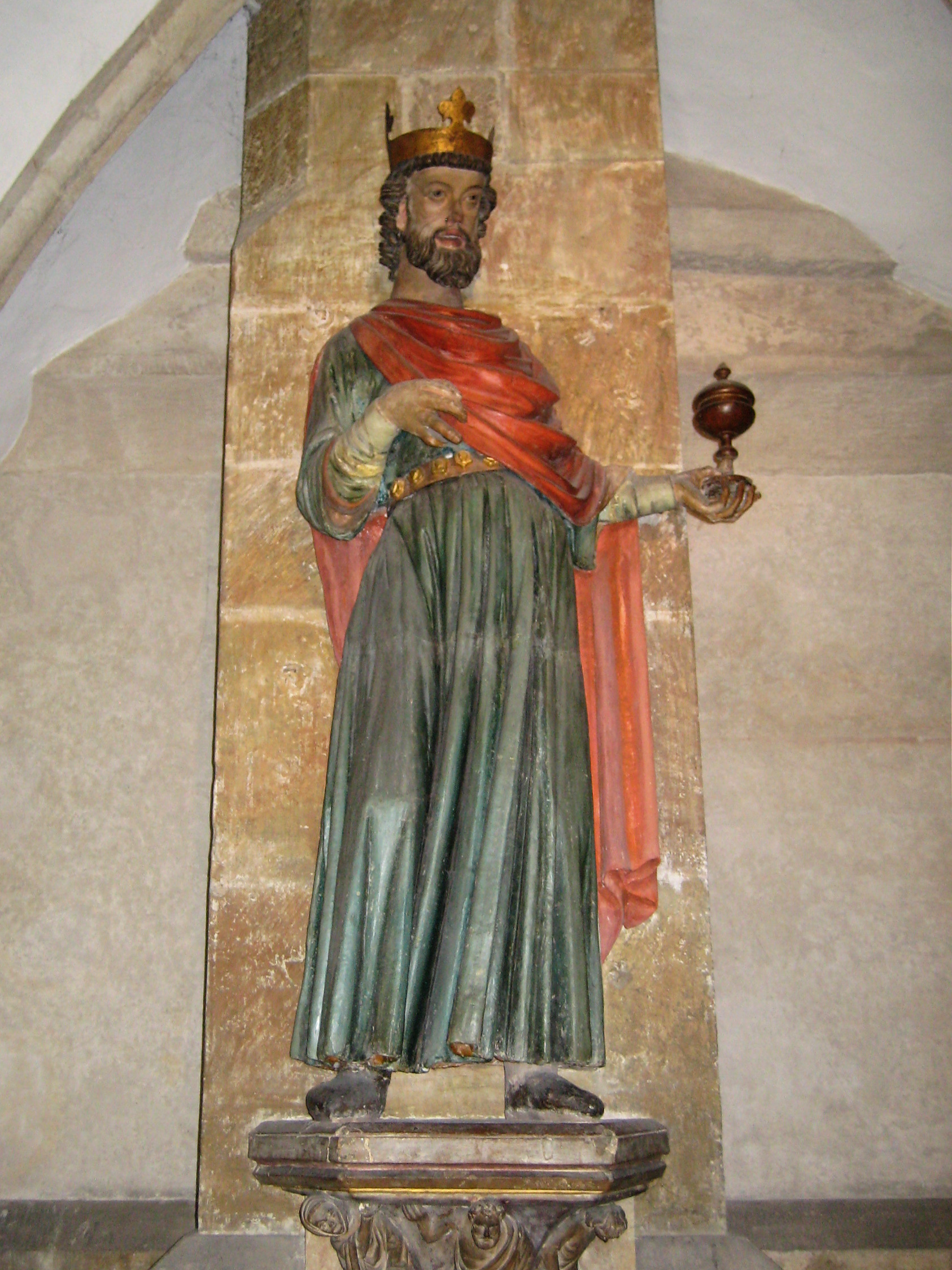 Statue des Hl. Oswald aus dem 1889 abgebrochenen Dollingerhaus (um 1280/90) im Historischen Museum in Regensburg. Zum Hl. Oswald und seiner Beziehung zu Regensburg siehe auch [1].